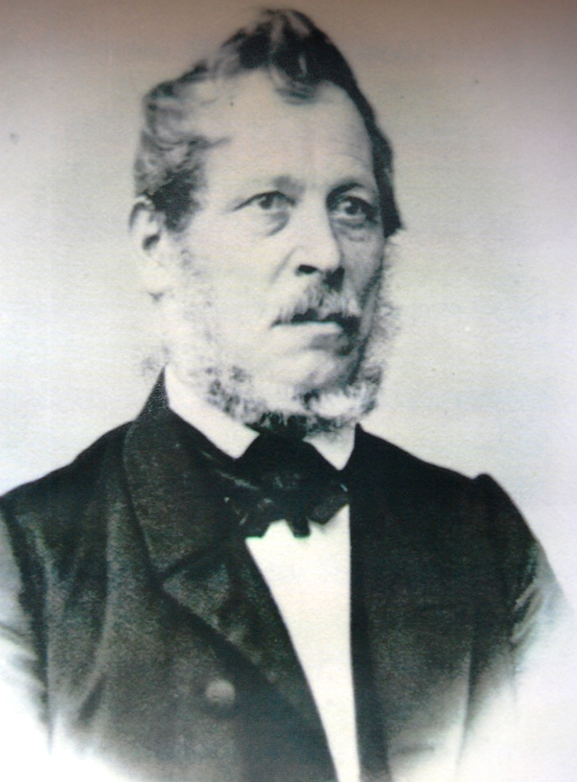 Johann Martin Hirschmann, ehemaliger Bürgermeister der Stadt Offenbach am Main